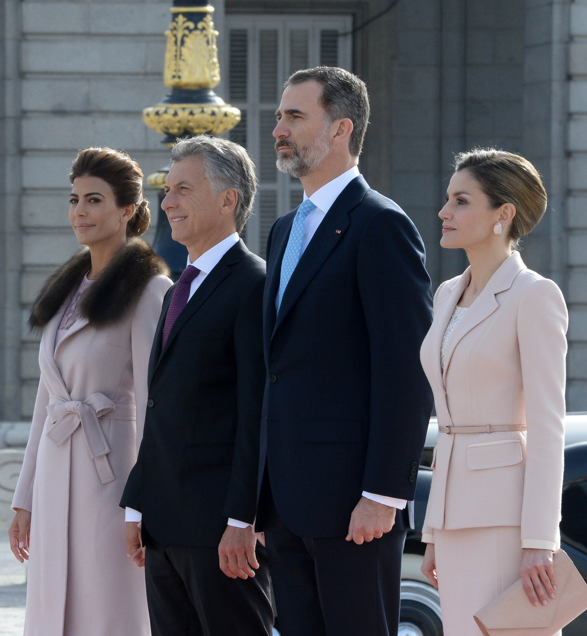 La primera dama Juliana Awada y la reina consorte de España, Letizia Ortiz dialogaron sobre los lazos que unen a ambos países y coincidieron en la importancia de trabajar en el cuidado de la niñez y el desarrollo integral de las mujeres.